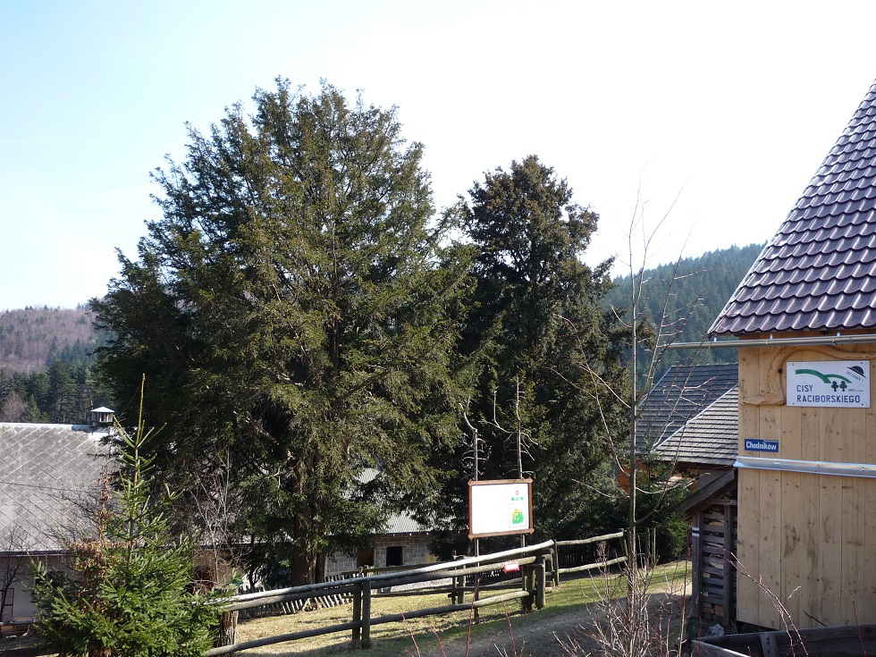 Harbutowice.Cisy Raciborskiego. Jedne z najstarszych drzew w Polsce.